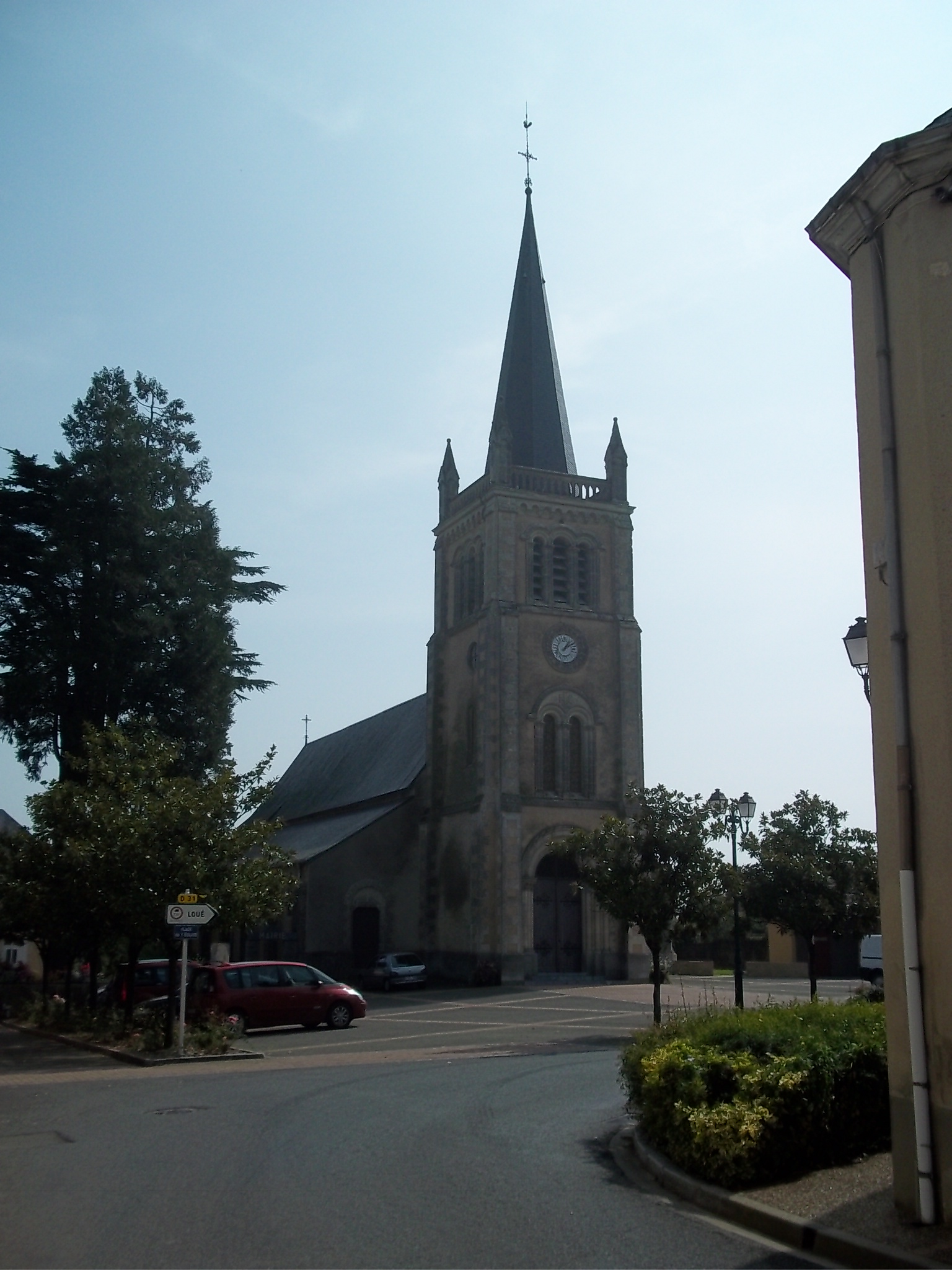 Eglise de Joué-en-charnie